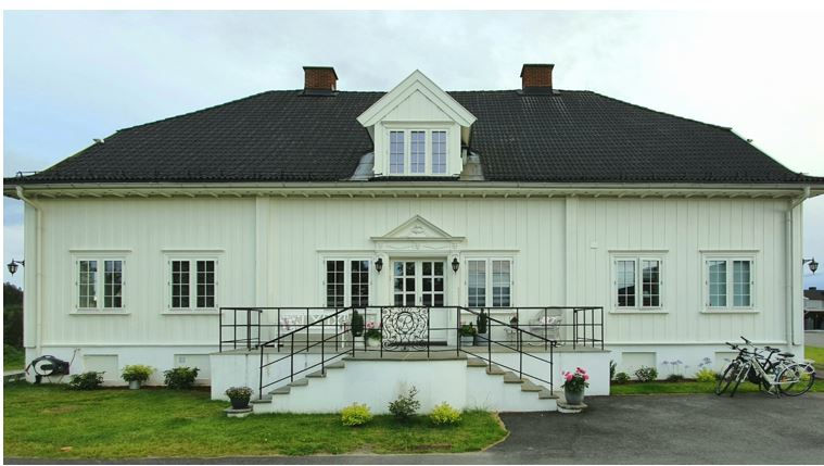 Hovedhuset (kårboligen) på Hønen gård slik det fremstår i 2019.